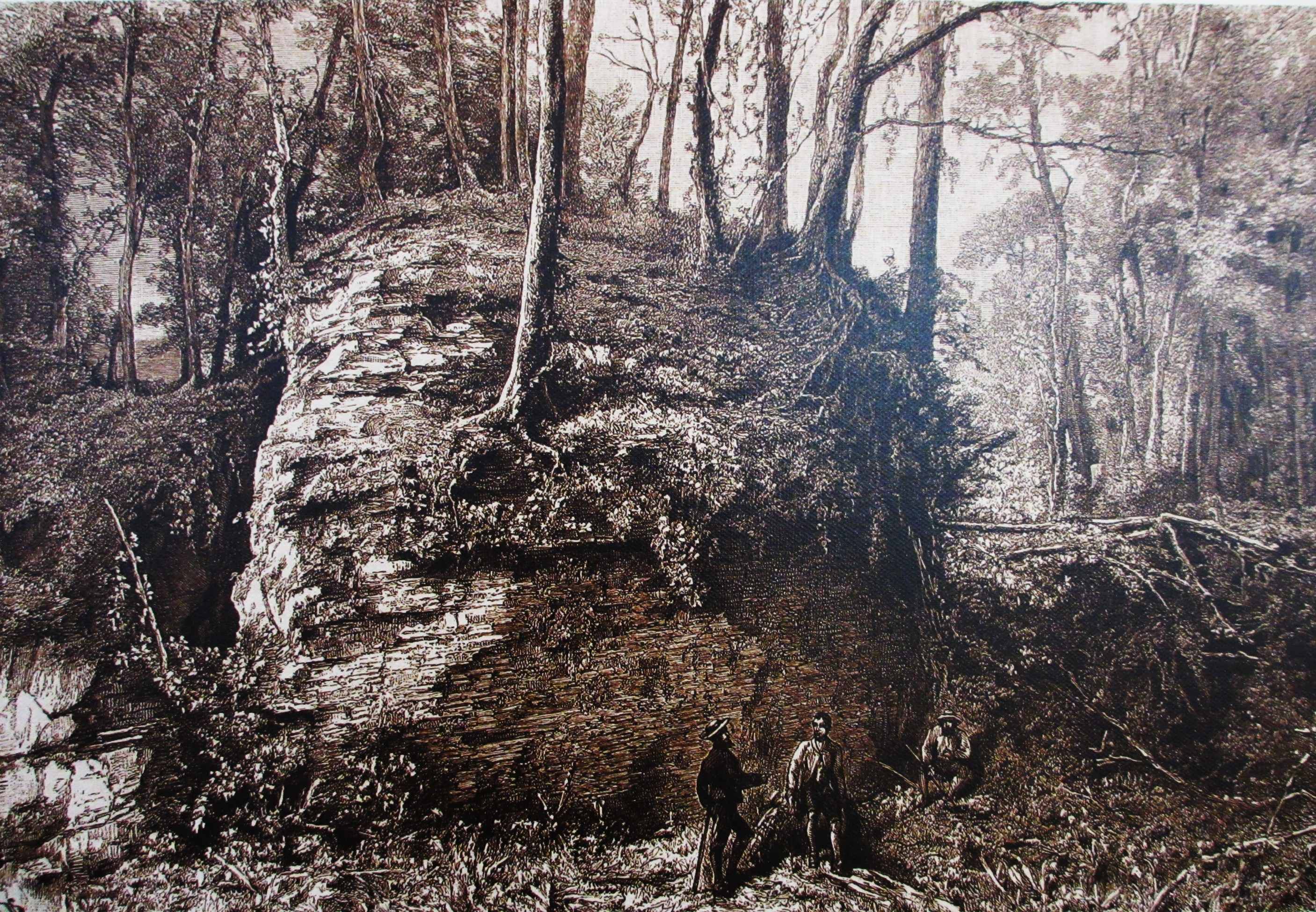 Litografía realzada por el explorador francés Désiré Charnay en el apartado titulado: "Descubrimiento de Comalcalco" . Museo de Sitio de la zona arqueológica maya de Comalcalco. Tabasco. México.